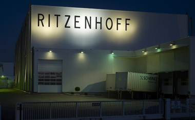 Lager_1 RITZENHOFF AG